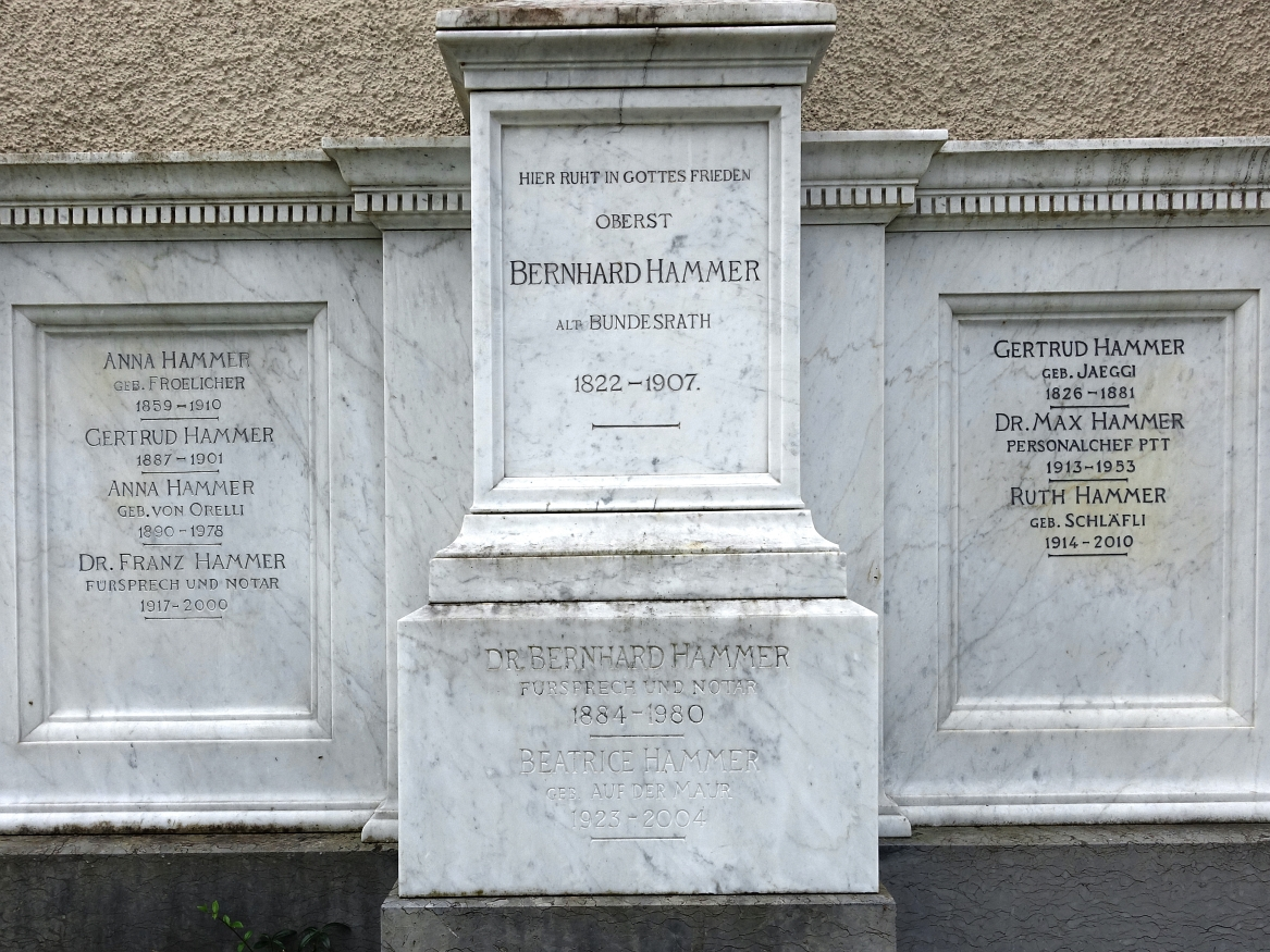 Bernhard Hammer (1822–1907) Politiker, Jurist, Diplomat. Familien Grab. Kirche St. Niklaus, Friedhof Feldbrunnen-St. Niklaus, Solothurn.